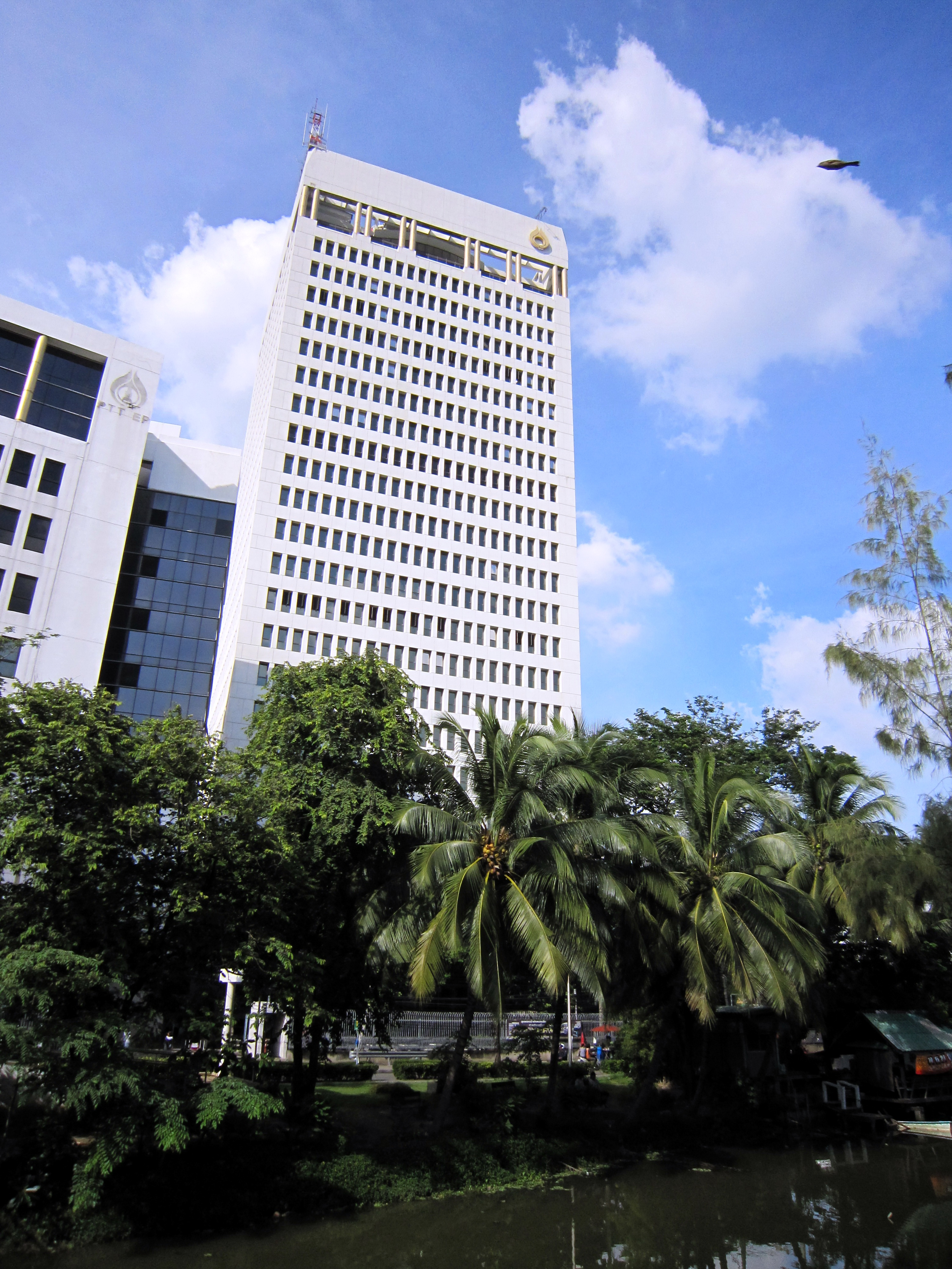 ตึก ปตท.